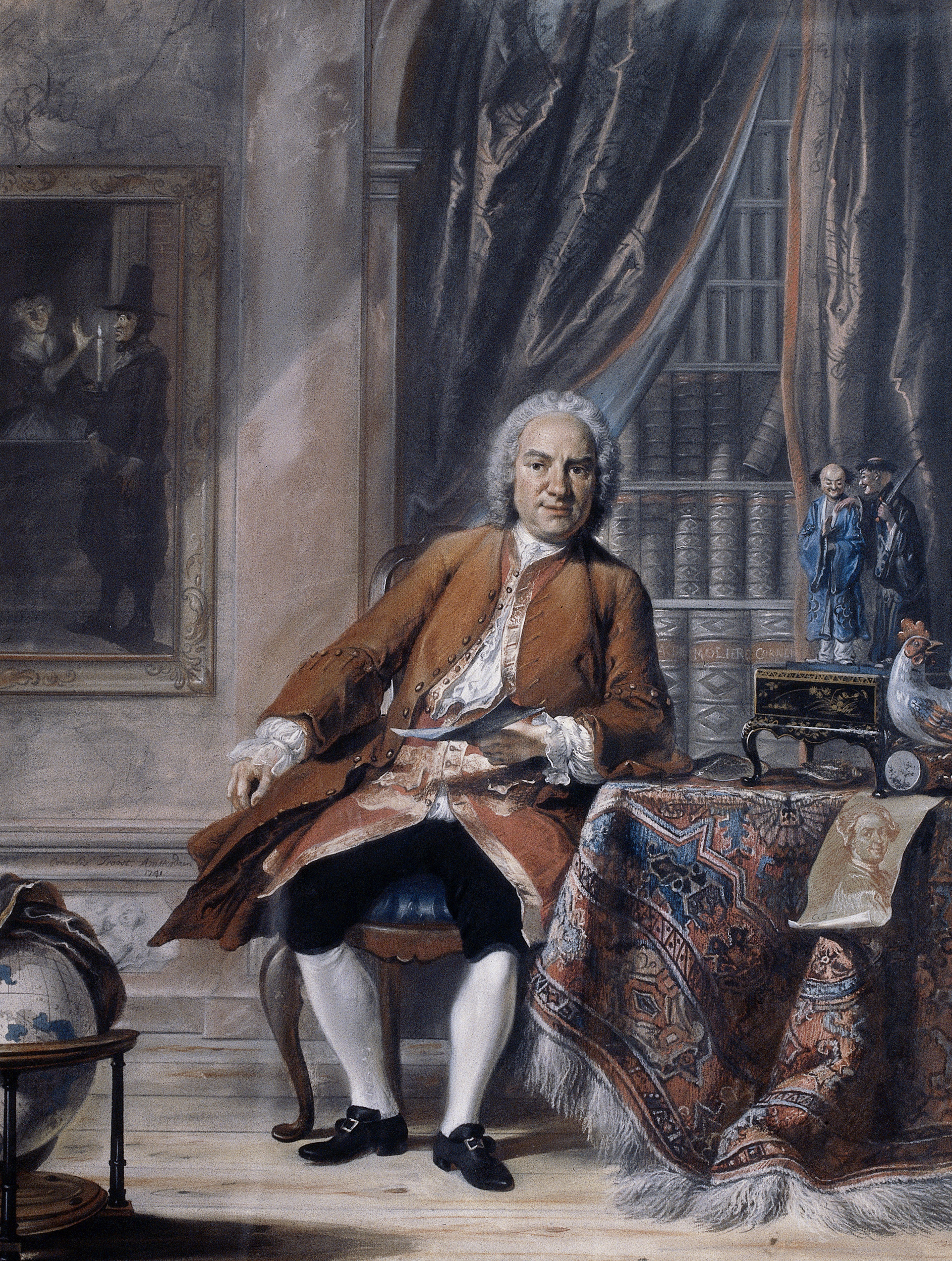 Portret van Jan Jacob Mauricius (1692-1768). Gouverneur-generaal van Suriname, dichter en toneelminnaar. Ten voeten uit, zittend aan een tafel. In de linkerhand een blad papier. Op tafel bedekt met een Perzisch kleed staan twee Chinese figuren op een lakkistje, een porceleinen haan, enkele schelpen en een getekend zelfportret van Cornelis Troost. Tegen de achterwand een boekenkast met toneelwerken en een schilderij met een voorstelling van de liefdesverklaring van Reinier Adriaansz uit het toneelstuk Jan Claesz of de gewaande Dienstmaagt van Thomas Asselijn. Op de vloer staat een globe. Onderdeel van de collectie pastels.